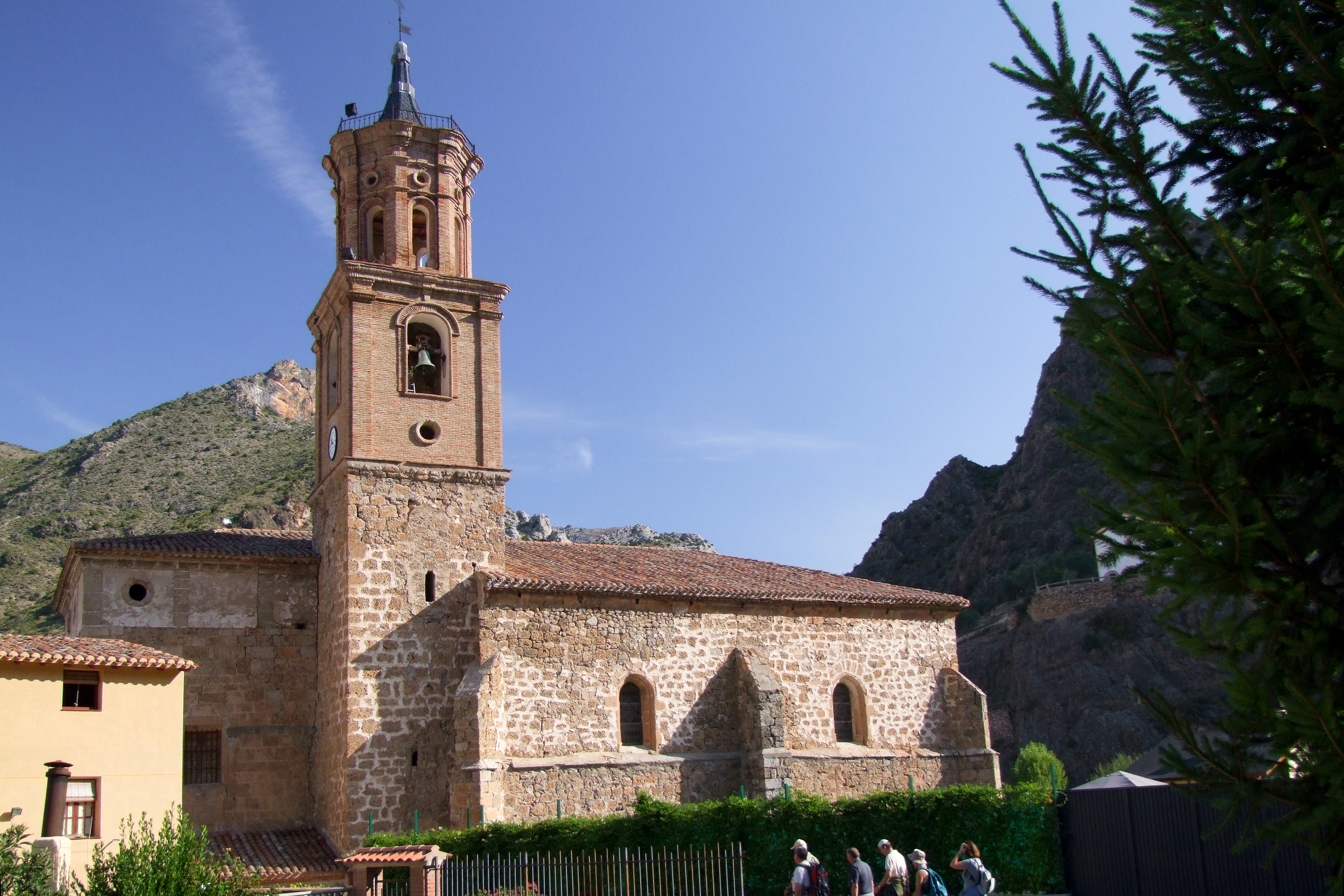 Iglesia de San Servando y San Germán en la localidad de Arnedillo, La Rioja - España